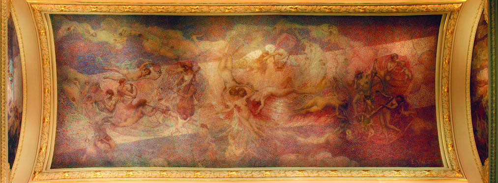 A MÚSICA - PAINEL CENTRAL DO FOYER DO THEATRO MUNICIPAL DO RIO DE JANEIRO - ÓLEO SOBRE TELA DE LONA - 7 x 16 m - 1916